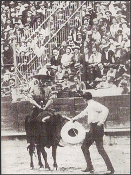 Andrés Becerril Arzate, el Charro del Siglo Nació el 30 de Noviembre de 1905 en San Bartolo Naucalpan, Estado de México, sus padres fueron Don Antonio Becerril Burgos y Doña Luciana Arzate de Becerril. Desde niño practicó las suertes charras heredadas y enseñadas por su padre, así fue templando su gran espíritu y cuerpo de atleta, desde muy joven recorrió junto con sus hermanos Antonio y Audomaro, los lienzos y plazas de la República Mexicana, más tarde fueron contratados para realizar giras en Estados Unidos Centro América y Europa, destacando la mancuerna formada por Andrés y Antonio, obtiene grandes triunfos en el viejo continente. Andrés se distinguió por dominar con gran maestría todas las suertes de la charrería, pero sobre todo destaca por su notable elegancia en el floreo de reata, manganas a pie y a caballo. Era certero de una manera inigualable y estirando incomparable. Fue también notable jinete sobre Yeguas Brutas y Toros de Casta, toreaba y banderilleaba a caballo, inclusive a pelo y a la lola. Tenía un gran dominio sobre el caballo y en uno de sus viajes a Estados Unidos compitió con los mejores caballistas del mundo, ganando la medalla como el mejor de todos, así como la de campeón mundial en el floreo de reata. Fue una pieza fundamental para el fomento de la charrería a nivel Nacional, creó la Escuela Charra que se ha distinguido por su lanzada grande y bonita. Digno heredero de estas artes ha sido su hijo Artemio, verdadero artista en el floreo de reata. Fue el hombre que llevó al extranjero con dignidad y nobleza el deporte nacional, el más notable exponente de la charrería de su época y uno de los más celebres charros de todos los tiempos. Con su arte logró ser el medio para fomentar las relaciones diplomáticas y algunos países como Venezuela. Contrajo nupcias con la Srita. Esperanza Ortiz Ceniceros, procrean una familia formada por seis hijos, con los cuales pasó los últimos años en su rancho de Atenco, murió el 18 de Diciembre de 1966.